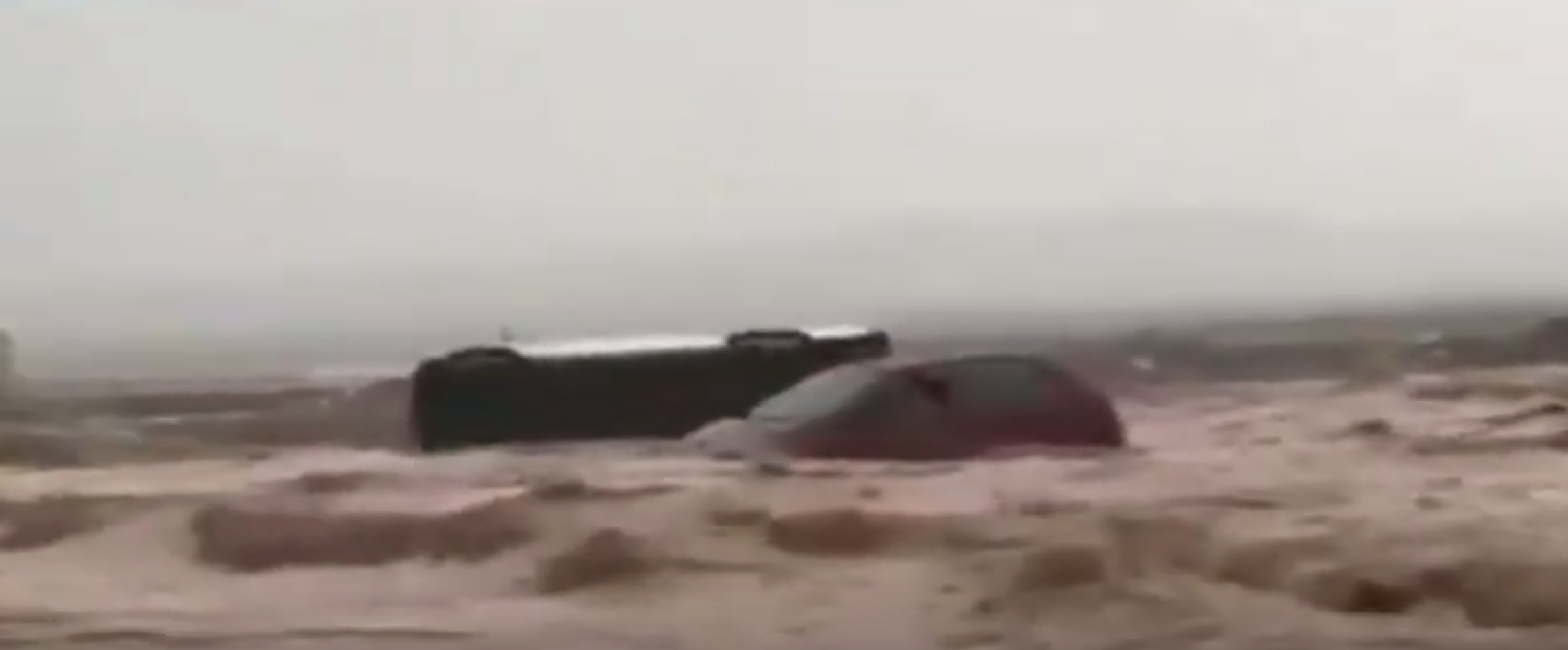 Iquique durante las lluvias de febrero 2019.